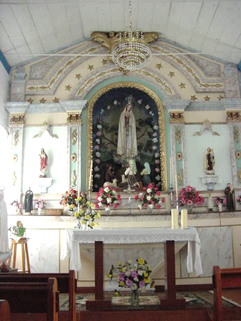 Interior da ermida de Nossa senhora de Fatima, Fajã da Ribeira da Areia, ilha de São Jorge, Açores, Portugal